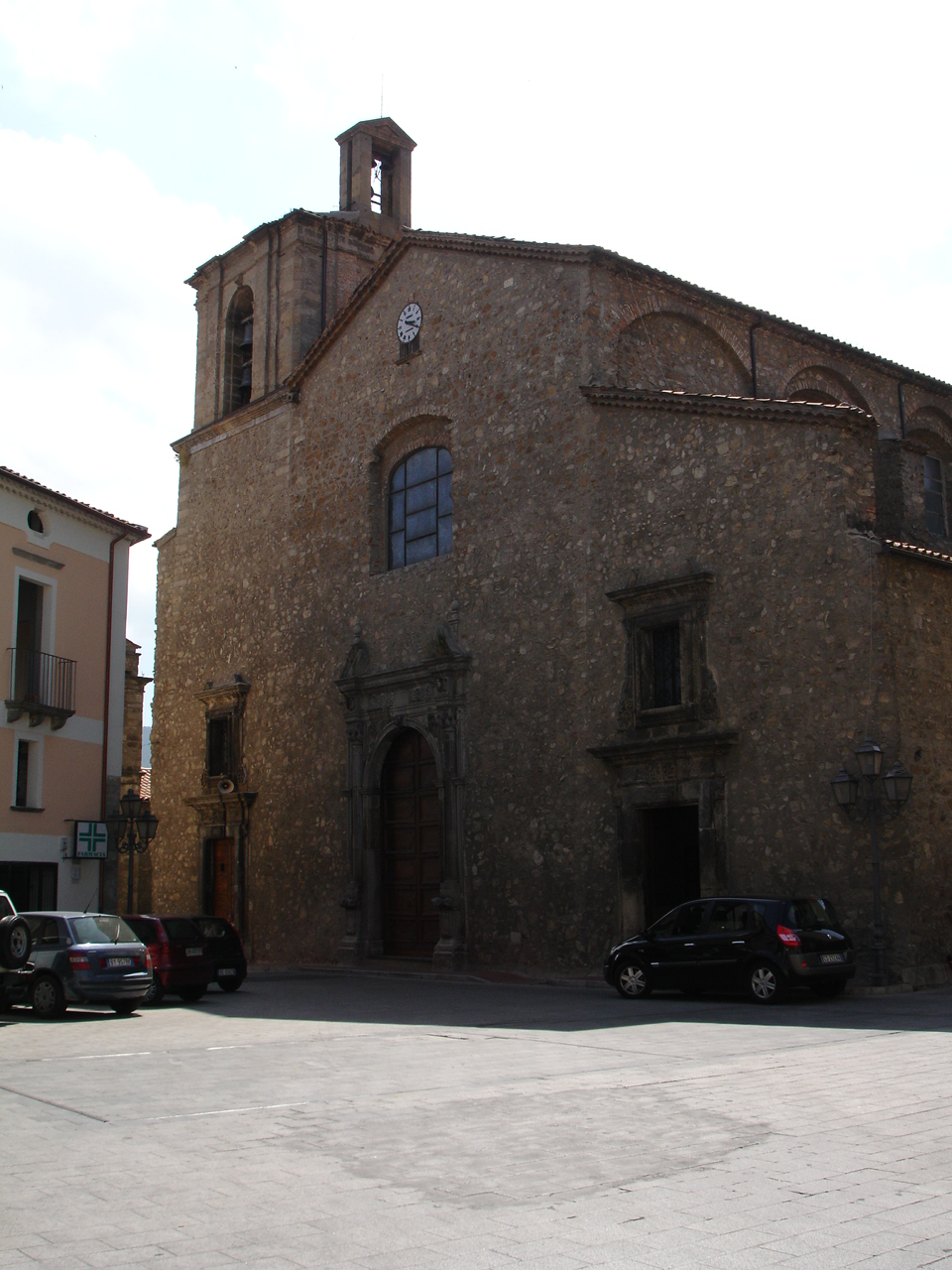 Piazza Abate Gioacchino con la Chiesa Madre. San Giovanni in Fiore